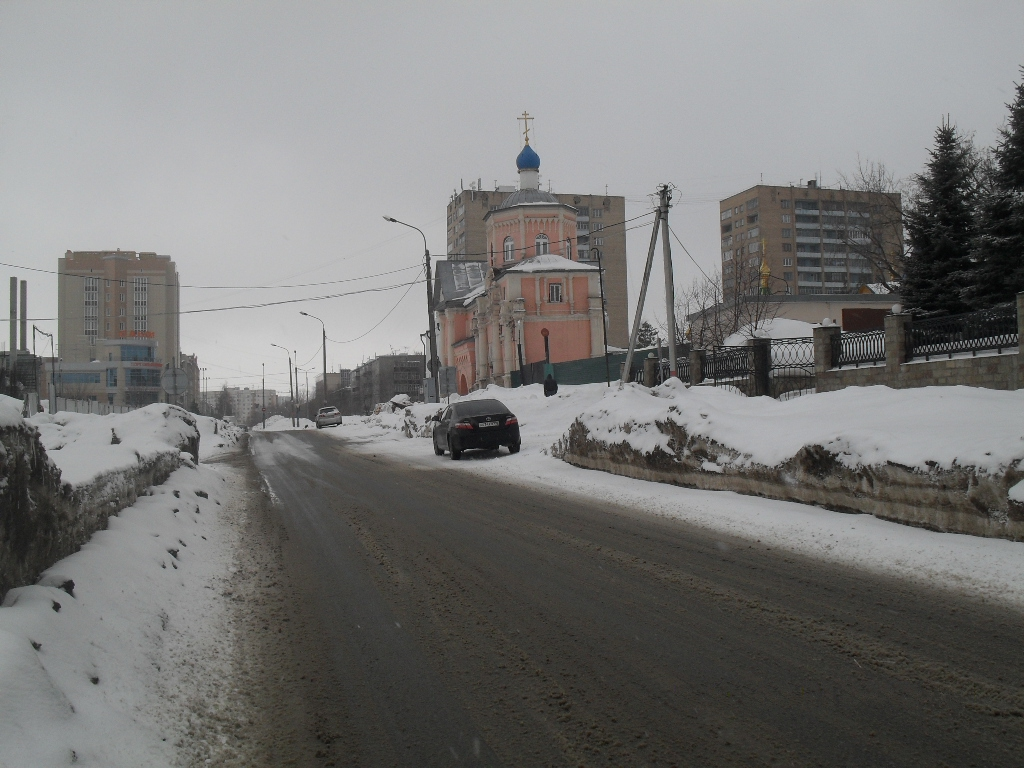 Изображение проезжей части улицы Правосудия. Вид на Кизический монастырь